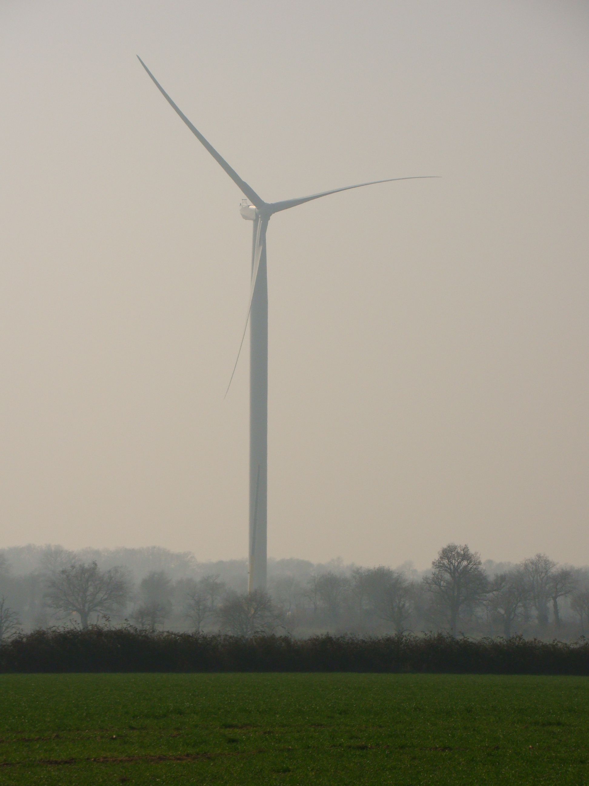 Eolienne du Parc des Versennes à Noirterre (Deux-Sèvres - France)